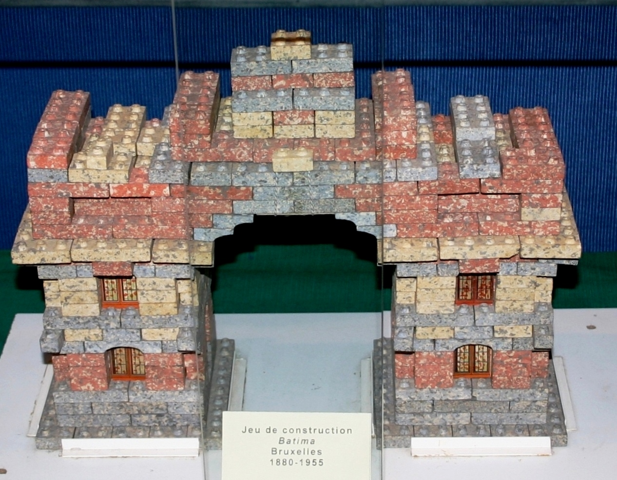 Bausténg vu Batima an enger Vitrine vum Spillsaachemusée zu Ferrières Kategorie:Spillgezei